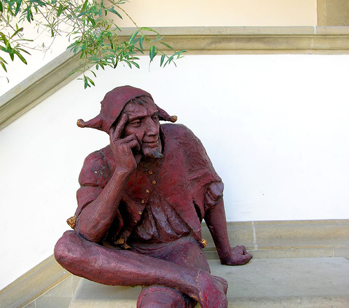 Statue of a jester in Niepołomice, Poland